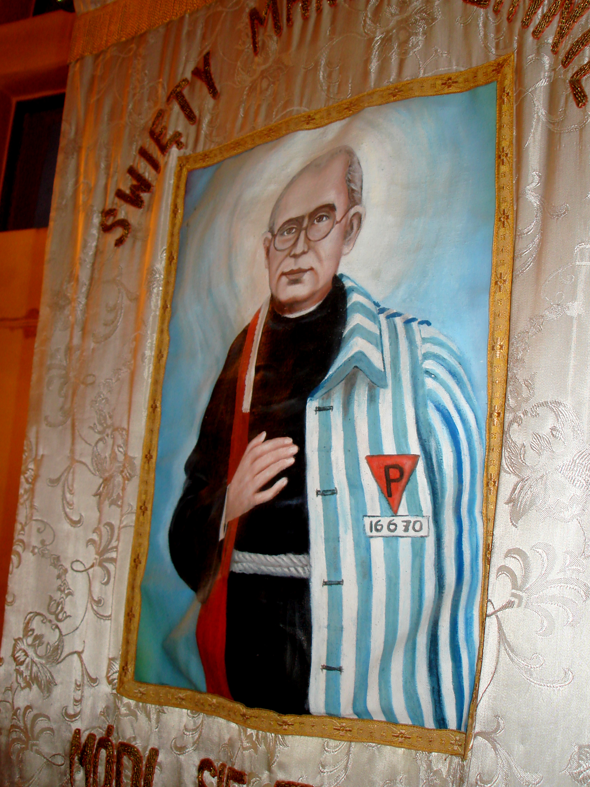 Sędzisław, kościół pw. św. Maksymiliana Kolbe, sztandar procesyjny